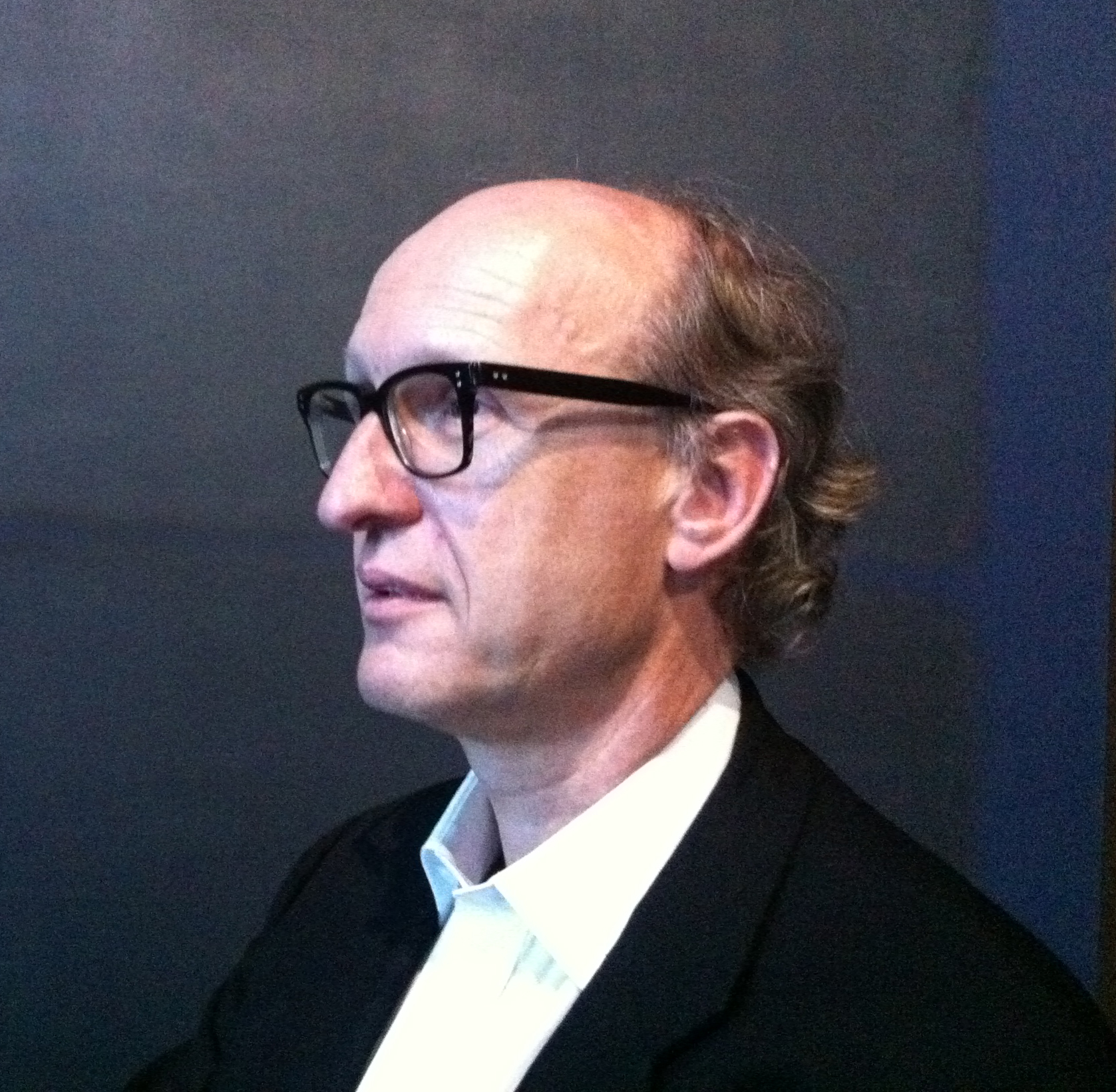 Markus Brüderlin, Direktor des Kunstmuseum Wolfsburg.